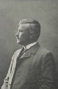 Sysselmand og landstingsmand Oliver Effersøe (1863–1933). Føroyskt: Sýslumaður og landstingsmaður Oliver Effersøe (1863–1933).